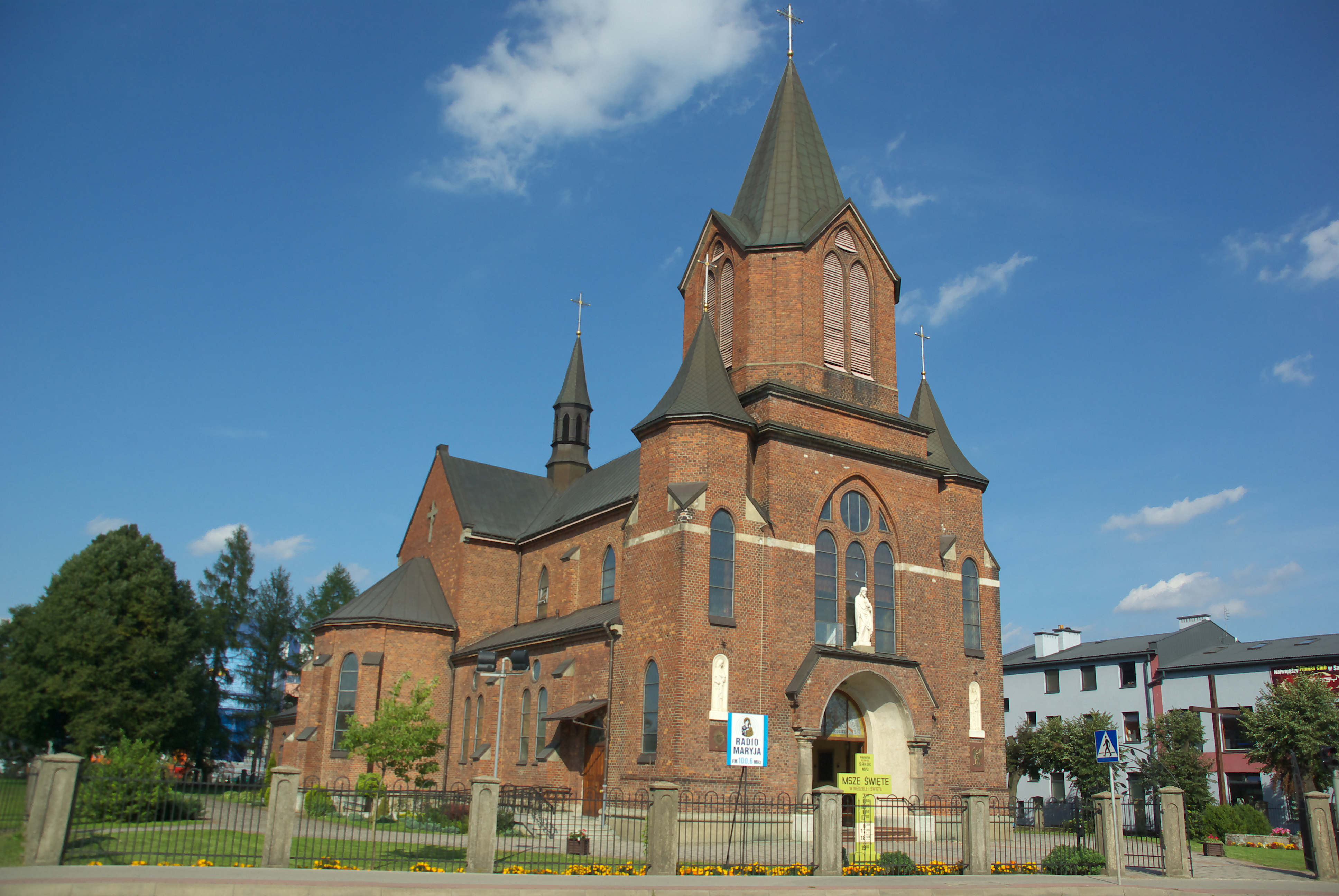 Church of the Sacred Heart in Sanok (Parafia Najświętszego Serca Pana Jezusa w Sanoku)